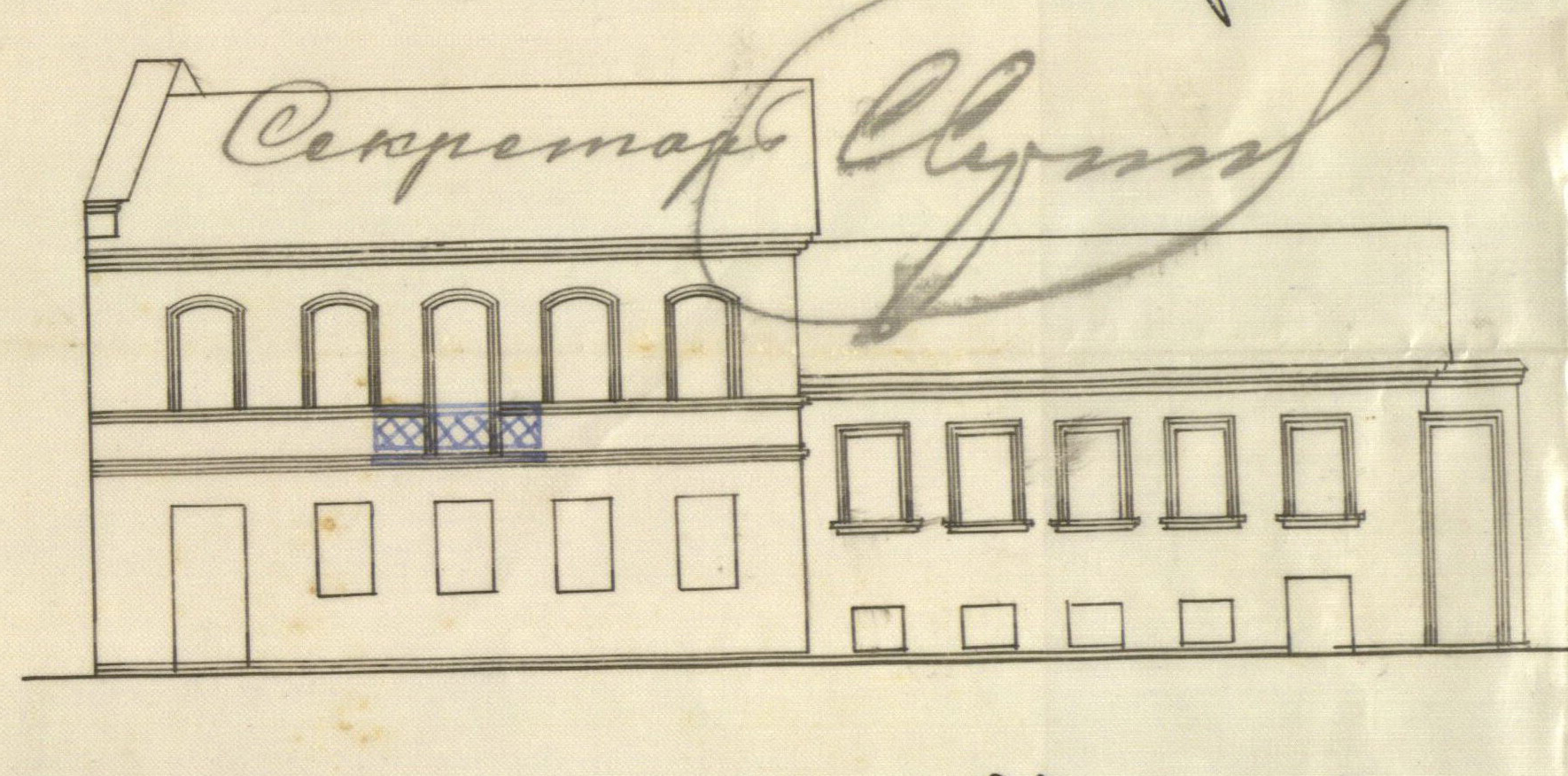 Беларуская (тарашкевіца): Менск (Miensk), вуліца Зборавая (vulica Zboravaja). Фасад дома М. Броня (Broń)